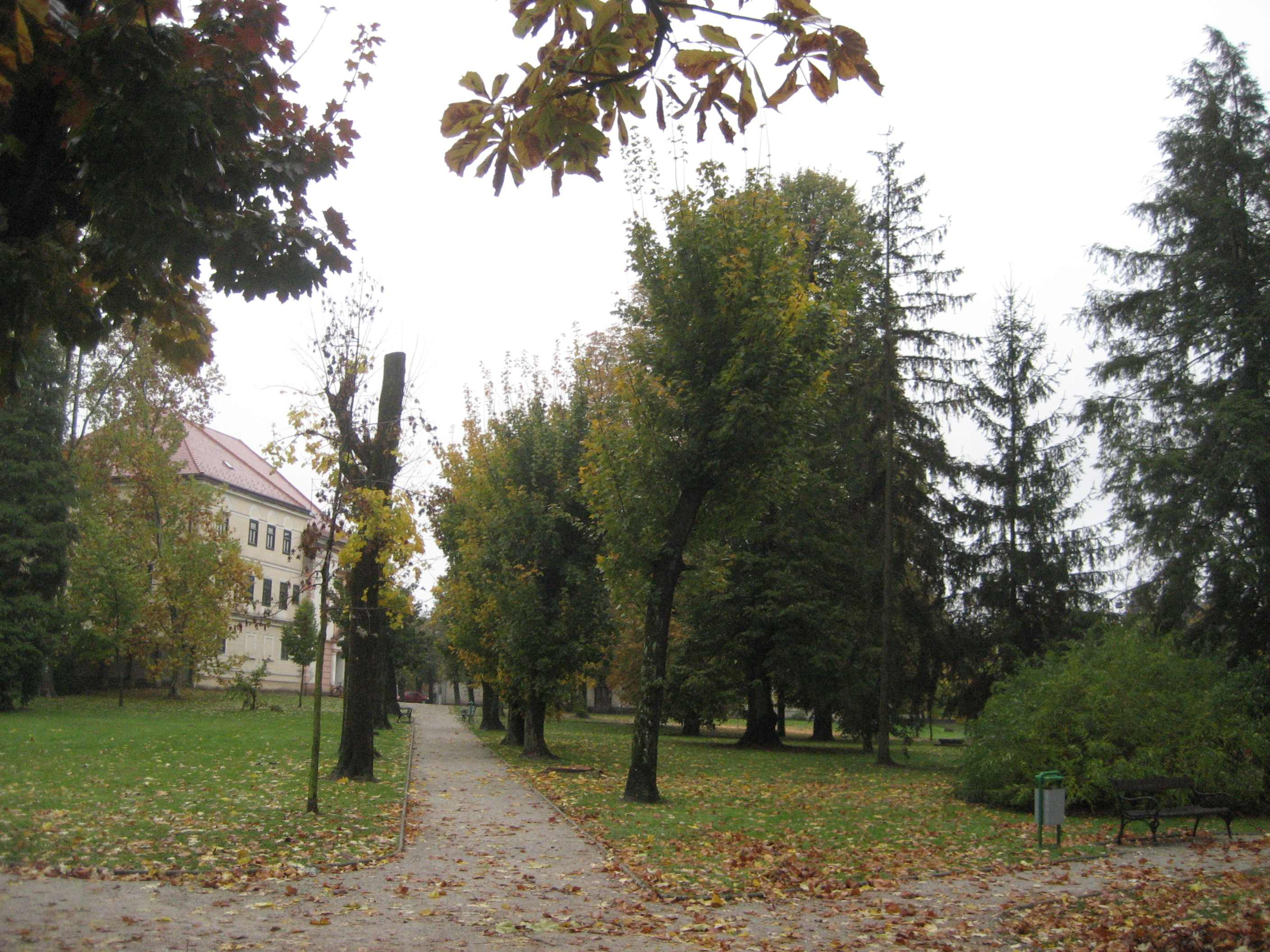 Park in Koprivnica